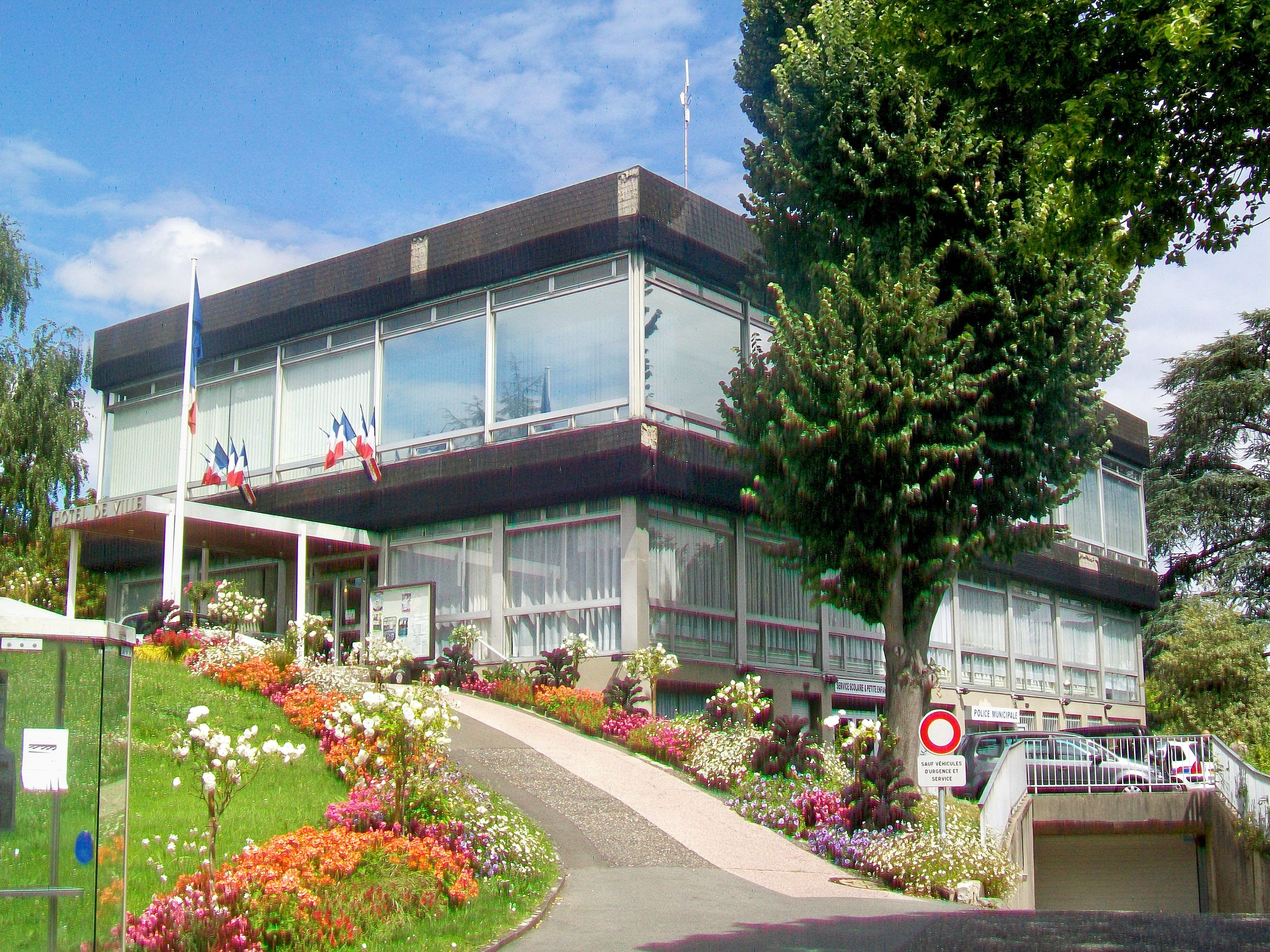 La mairie de Saint-Brice-sous-Forêt, 14 rue de Paris.